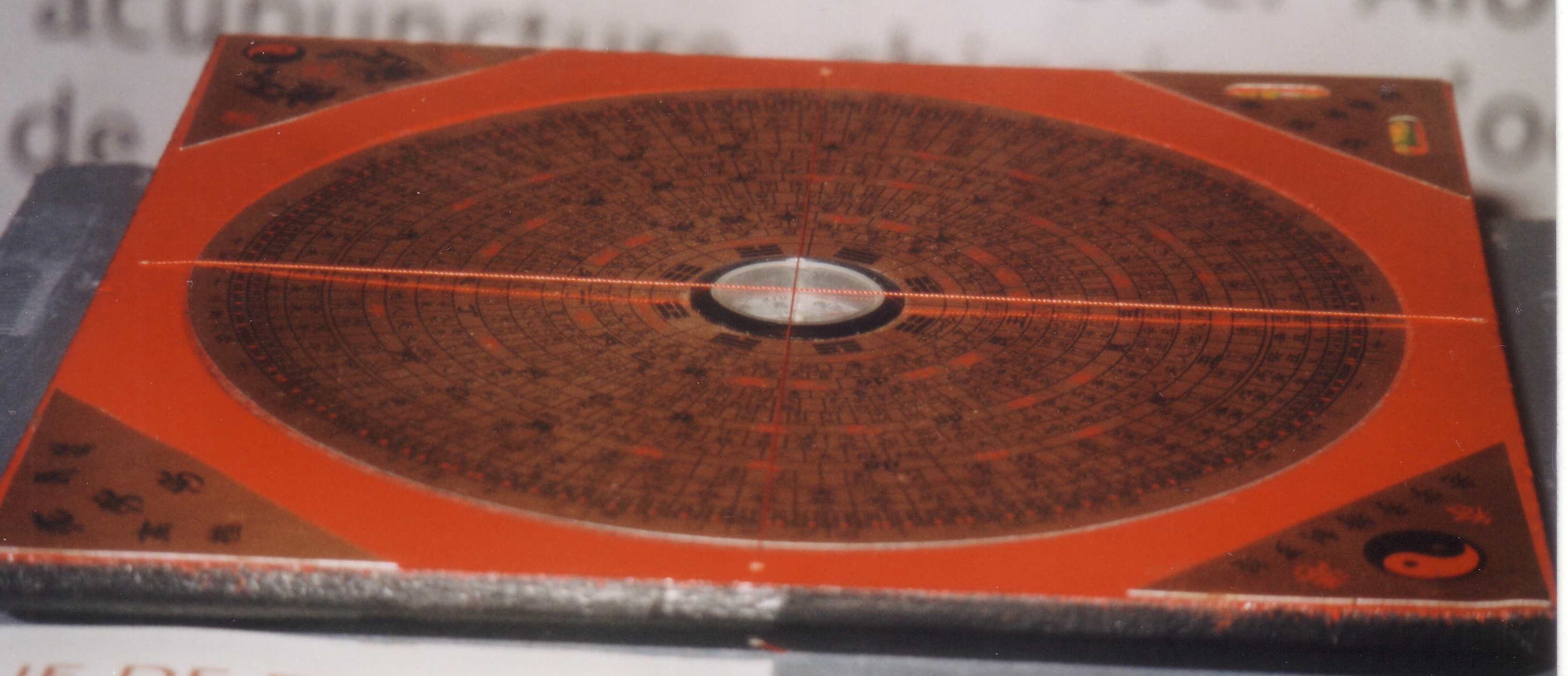 Luo pan Kompass.